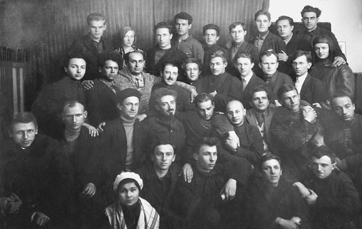 Писатели-члены МАПП (московской ассоциации пролетарских писателей).